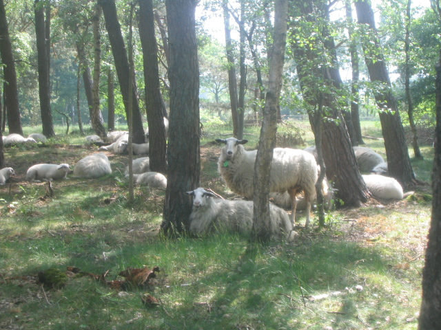 Bentheimer Landschafe